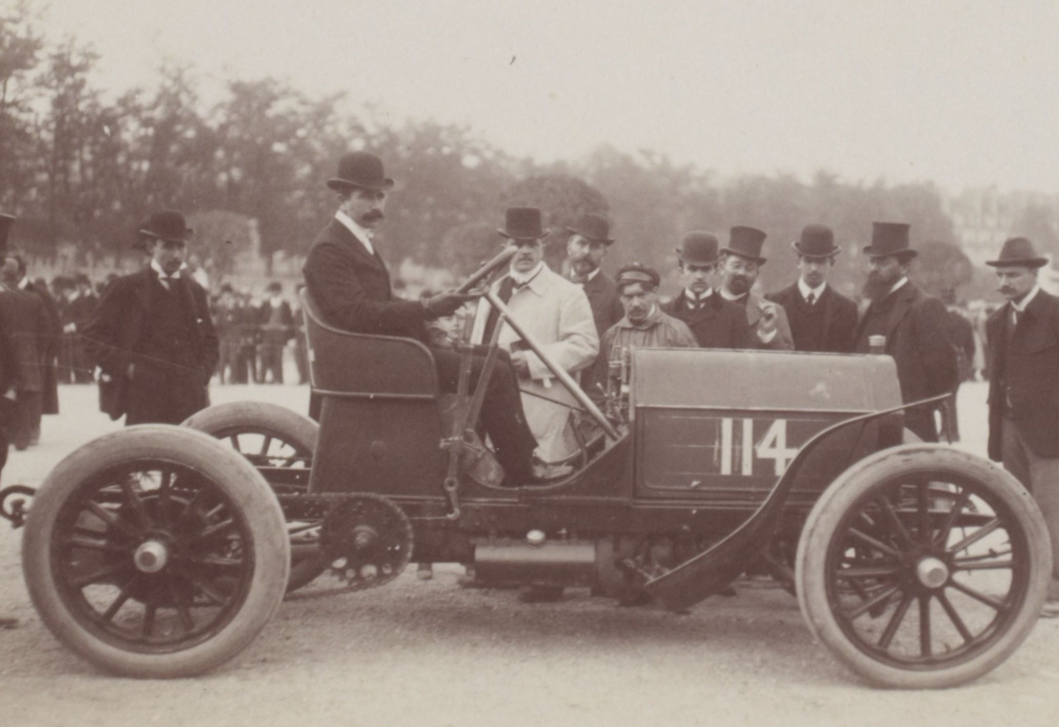 [Collection Jules Beau. Photographie sportive] : T. 21. AnnÃ©e 1903 / Jules Beau : F. 25v. [Paris - Madrid, Tuileries, 19 - 22 mai 1903]